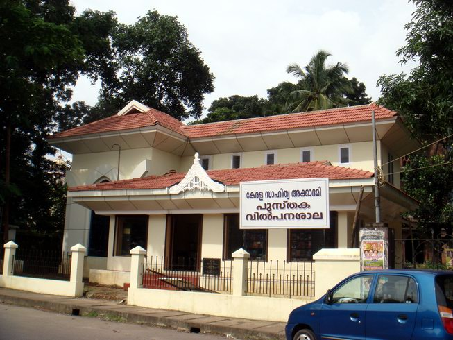 പടത്തിൽ എല്ലാം ഉണ്ട്